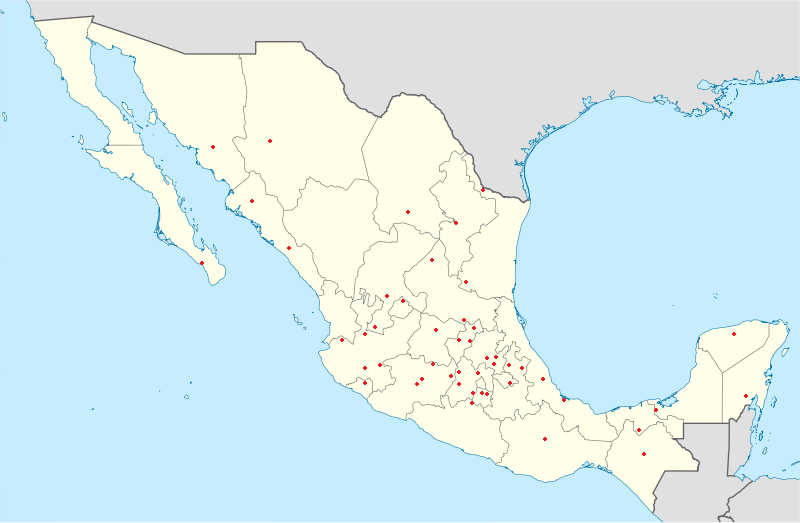 Mapa que muestra la ubicación de los pueblos mágicos en México en el 01 de enero de 2012.